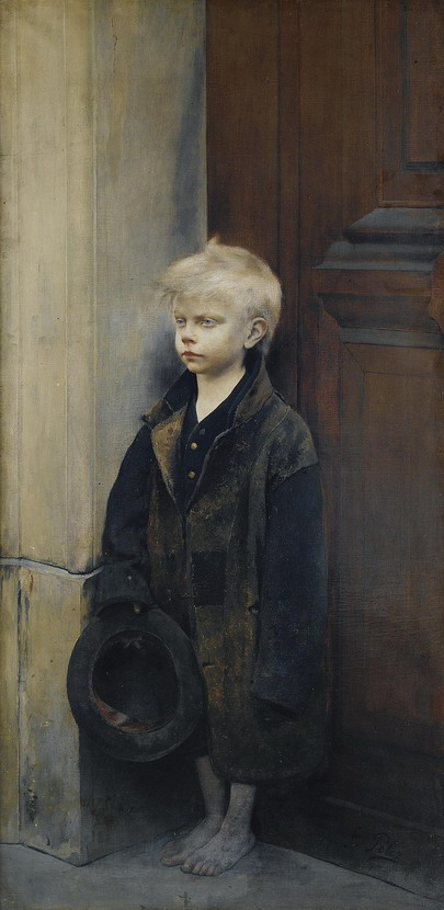 Картина з зображенням дитини жебрака